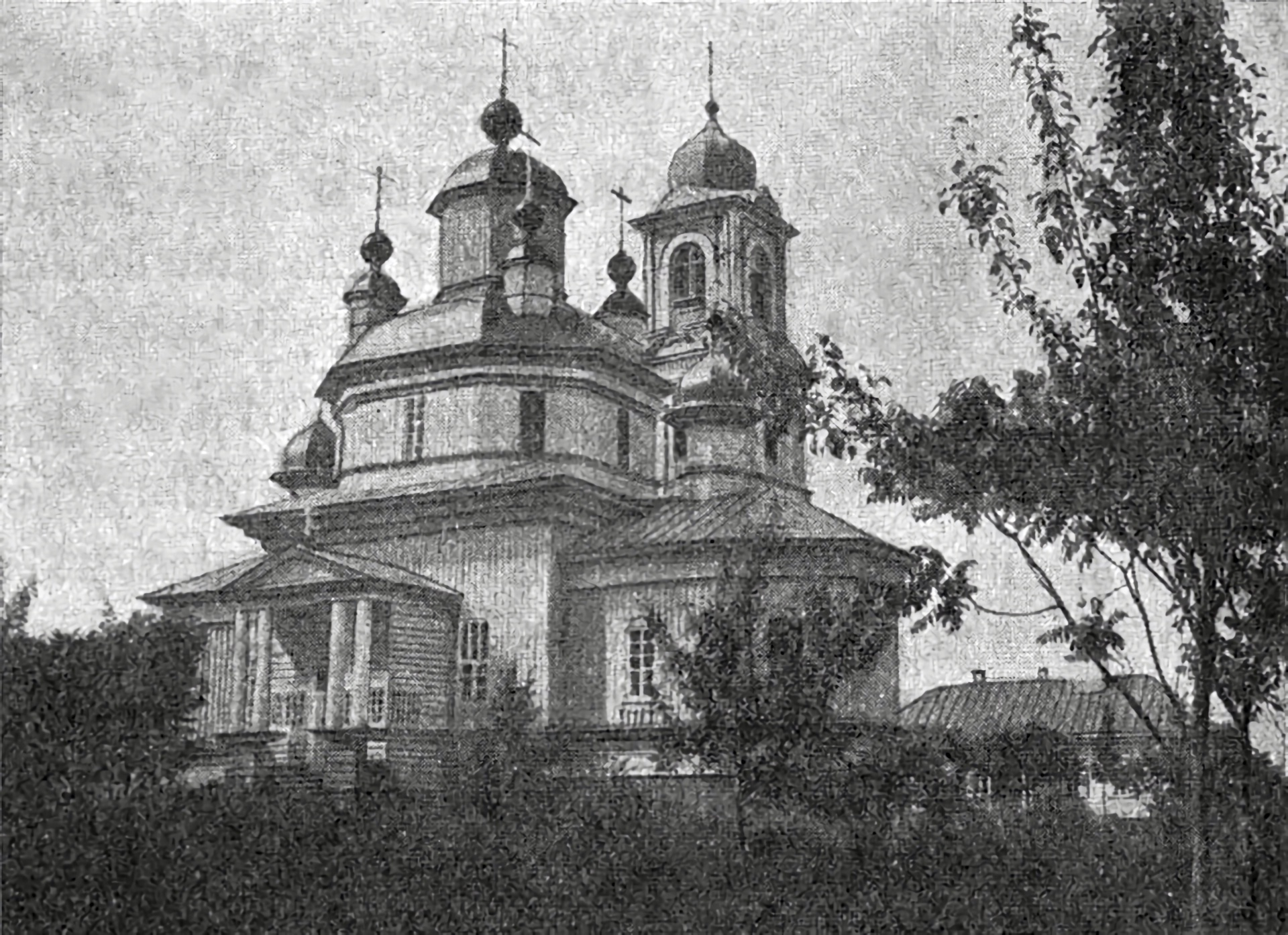 Беларуская (тарашкевіца): Гомель (Homiel), Чонкі (Čonki). Манастыр